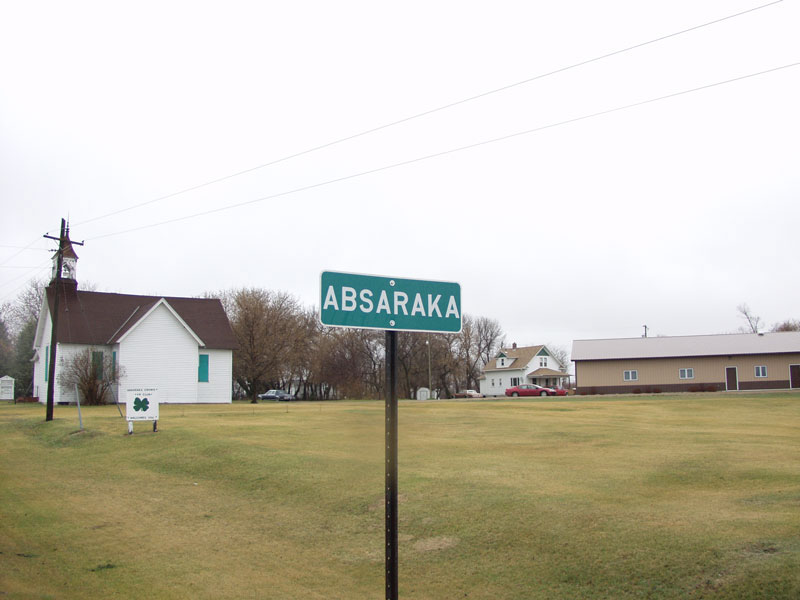 Absaraka, North Dakota. From